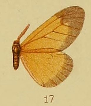 Staphylinochrous euryperialis